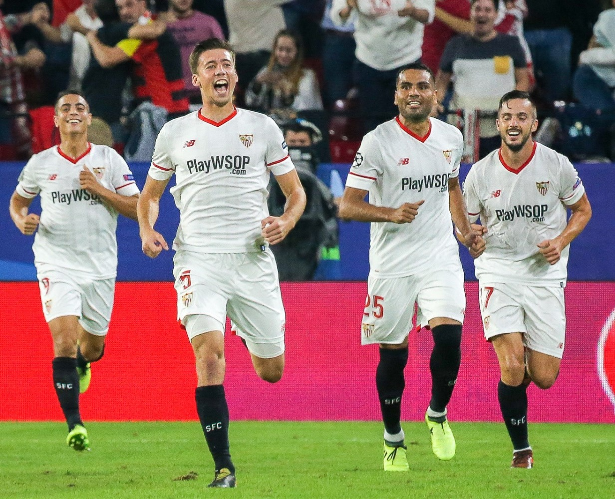 De gauche à droite : Wissam Ben Yedder, Clément Lenglet, Gabriel Mercado, Pablo Sarabia